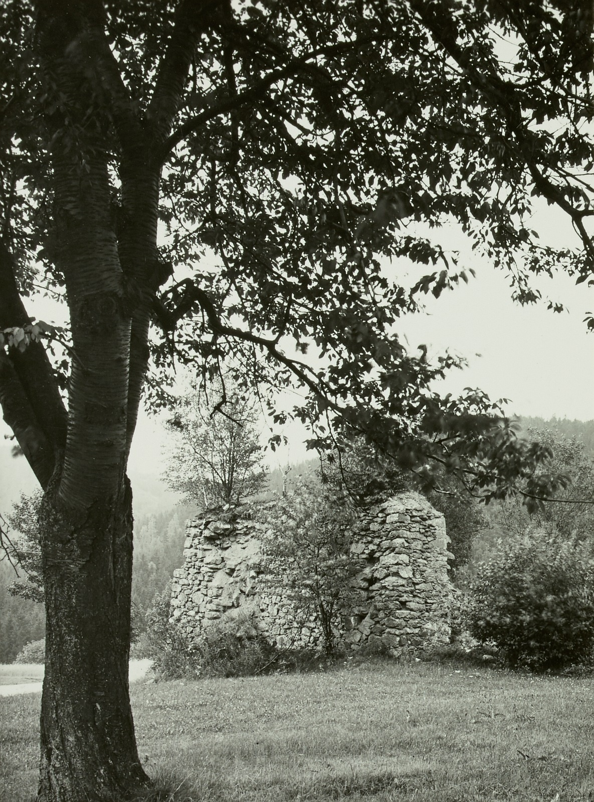 Johnsbach-Bärenhecke, St. Christoph Fundgrube, Ruine eines Grubengebäudes am Hang des Müglitztales